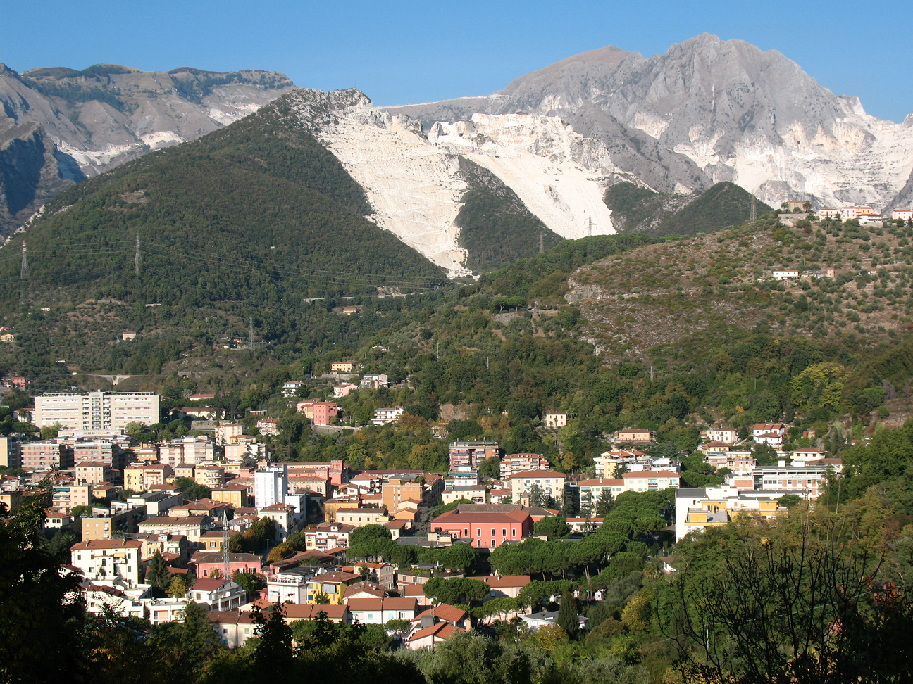 Carrara